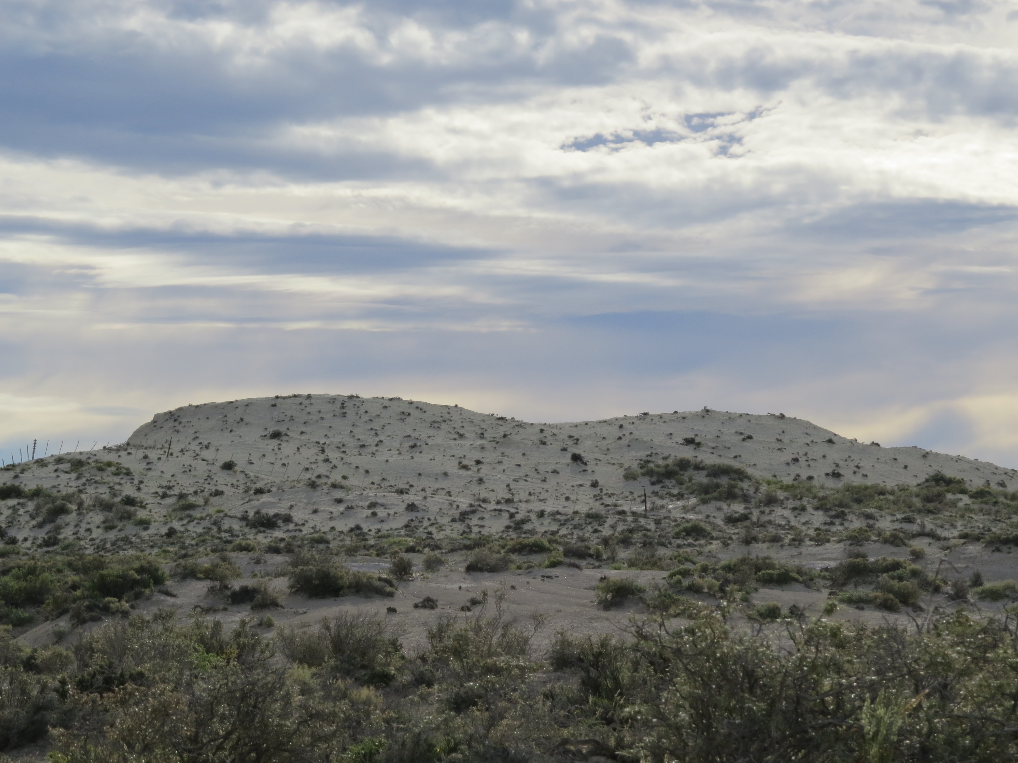 Loma Blanca - Bryn Gwyn (Y Wladfa, Argentina)